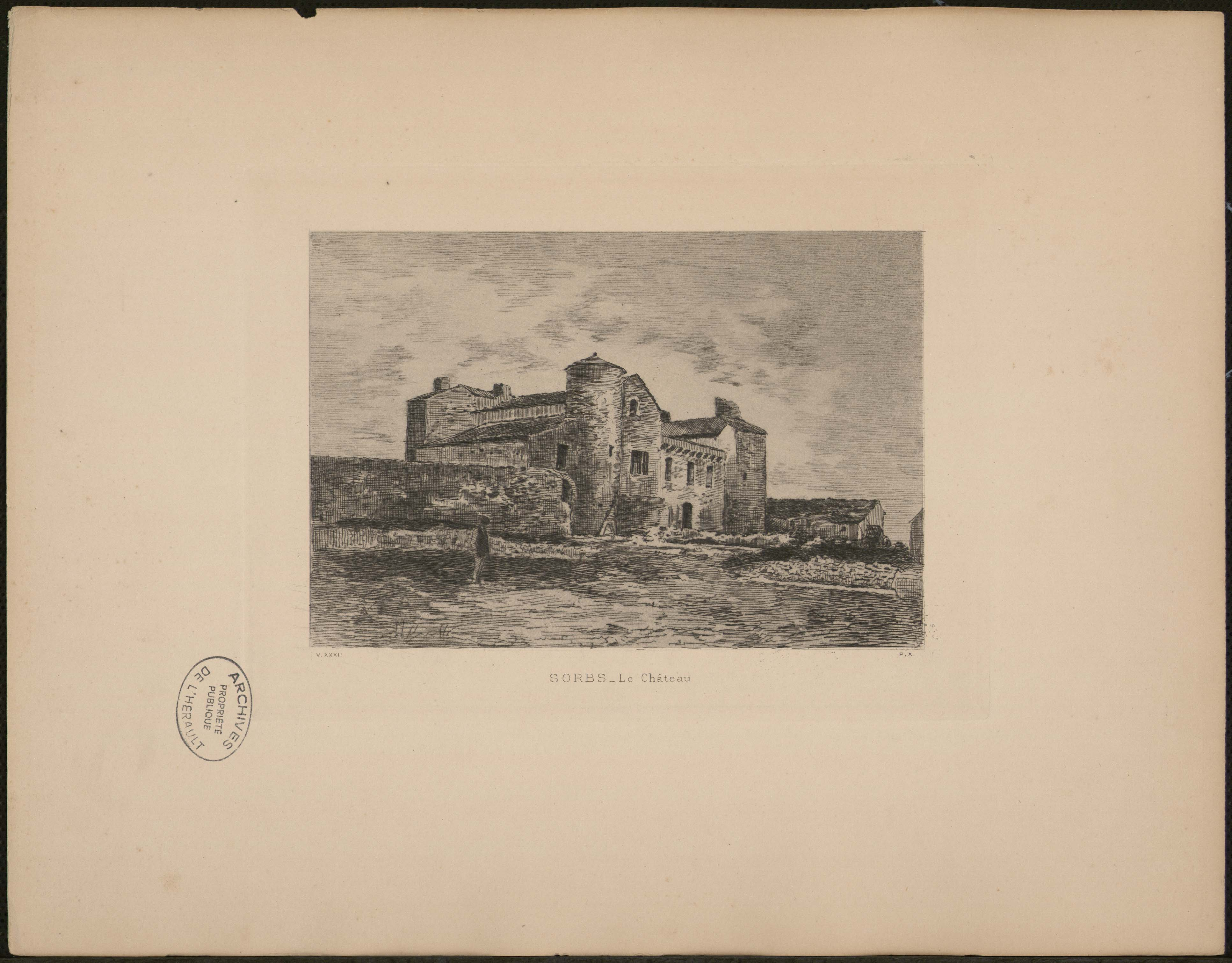 Sorbs. - Le château : gravure tirée de "Histoire des communes de l'Hérault" par Albert Fabre.